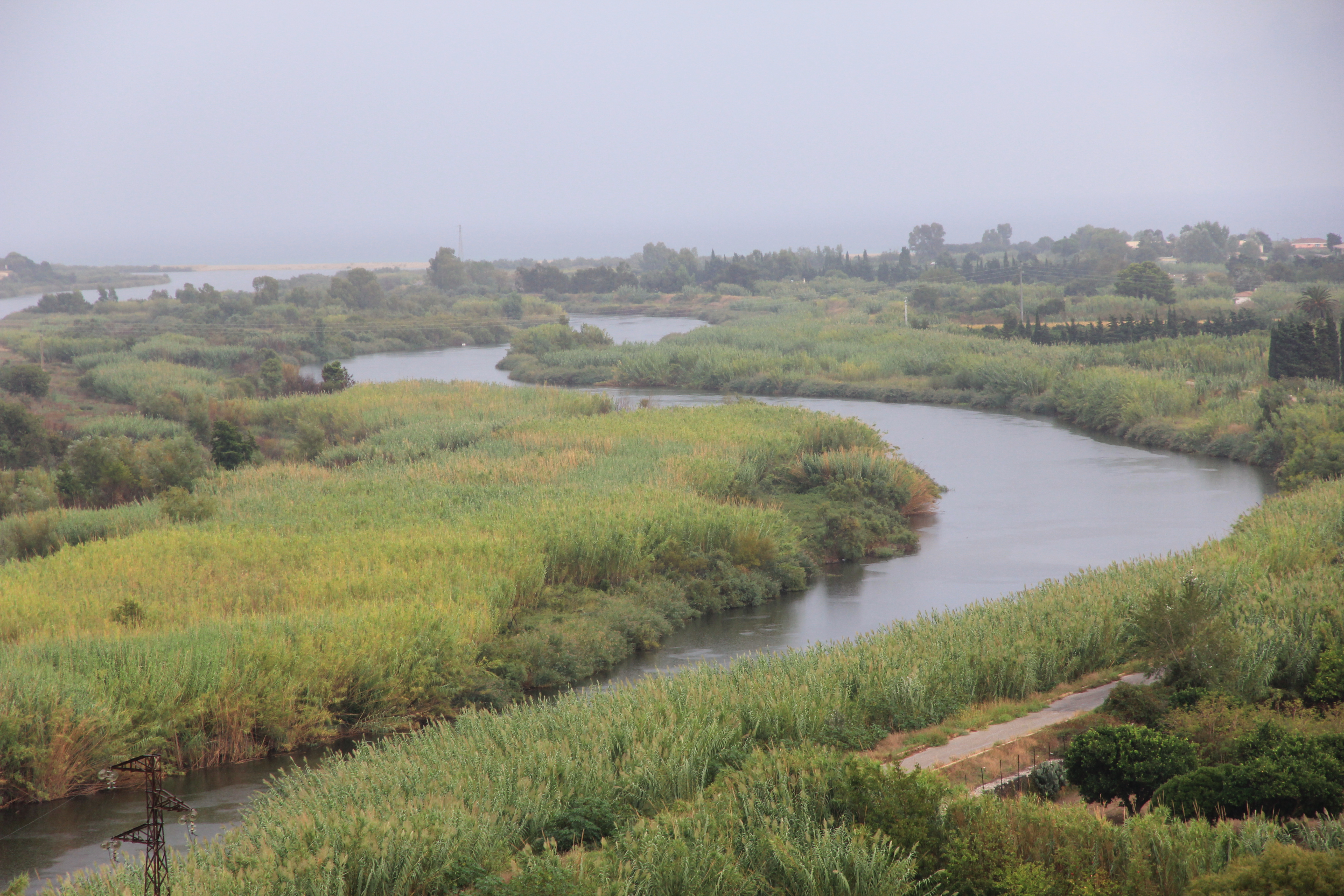 Orosei - Fiume Cedrino